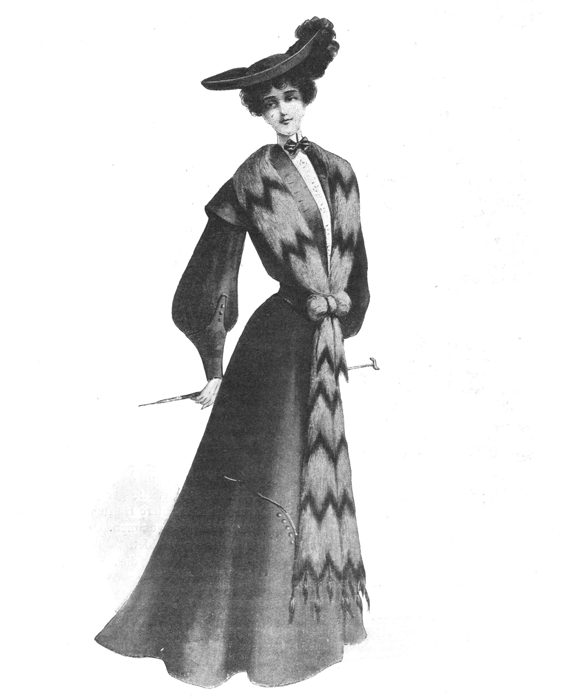 Preisausschreiben der Zeitschrift Das Kürschner-Handwerk. Bildunterschrift: 2. Preis: „Sophia“. Mantel mit Fehrückenbesatz. Der Preis ging an einen ungenannten Wiener Kürschner.